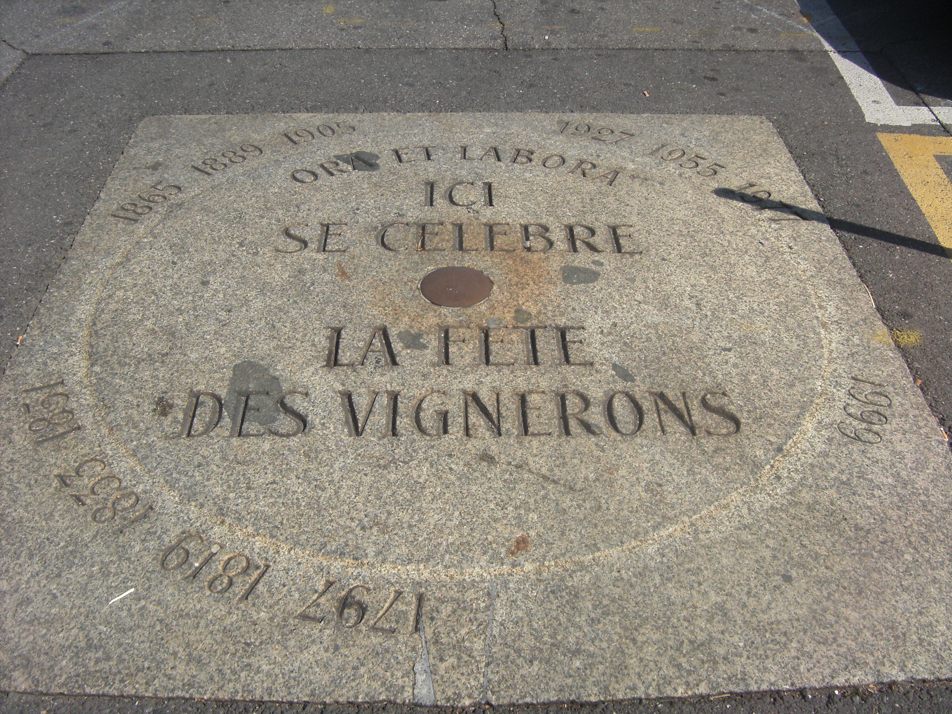 Vevey - fête des Vignerons - dalle commémorative sur la place du Marché